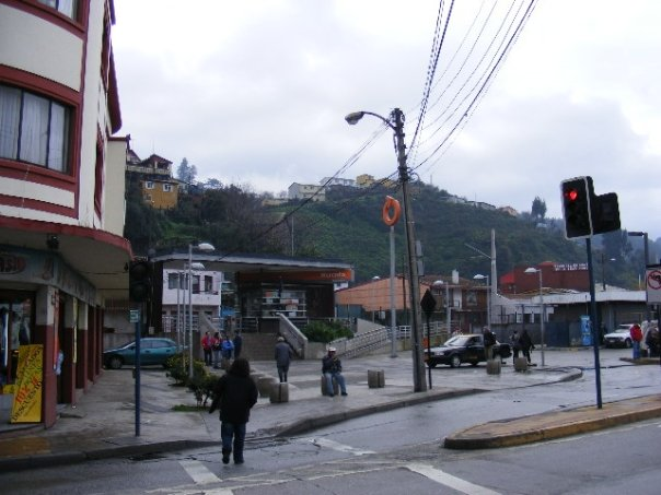 Estacion Biotren El Mercado, Talcahuano Centro